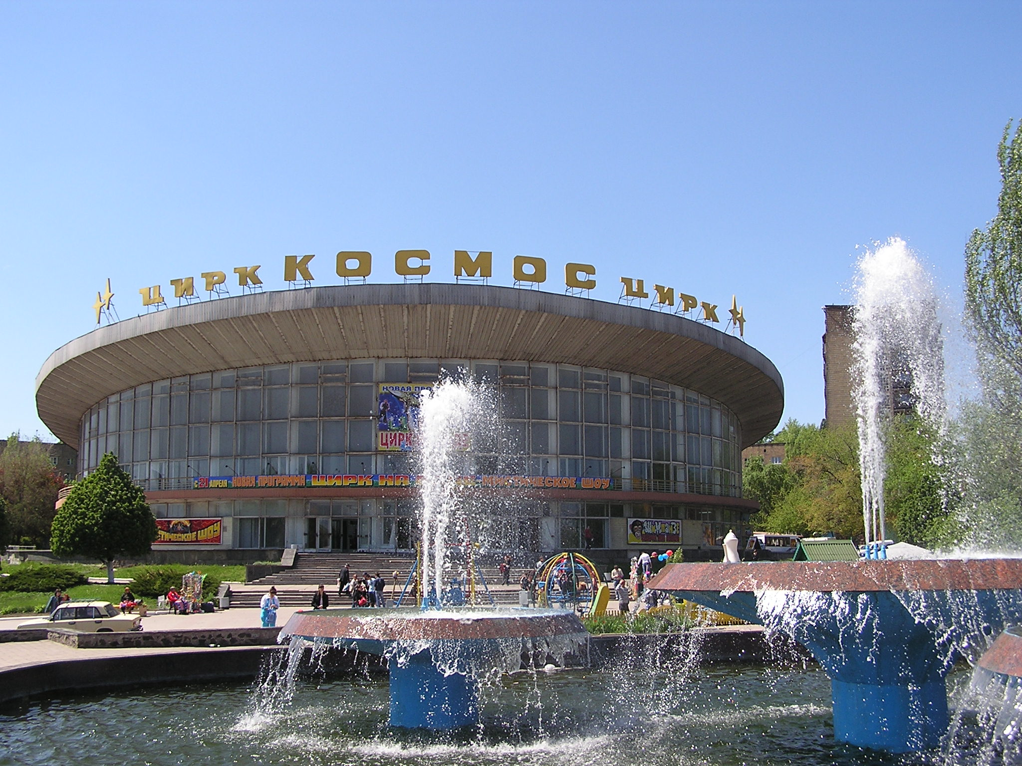 Донецк. Цирк